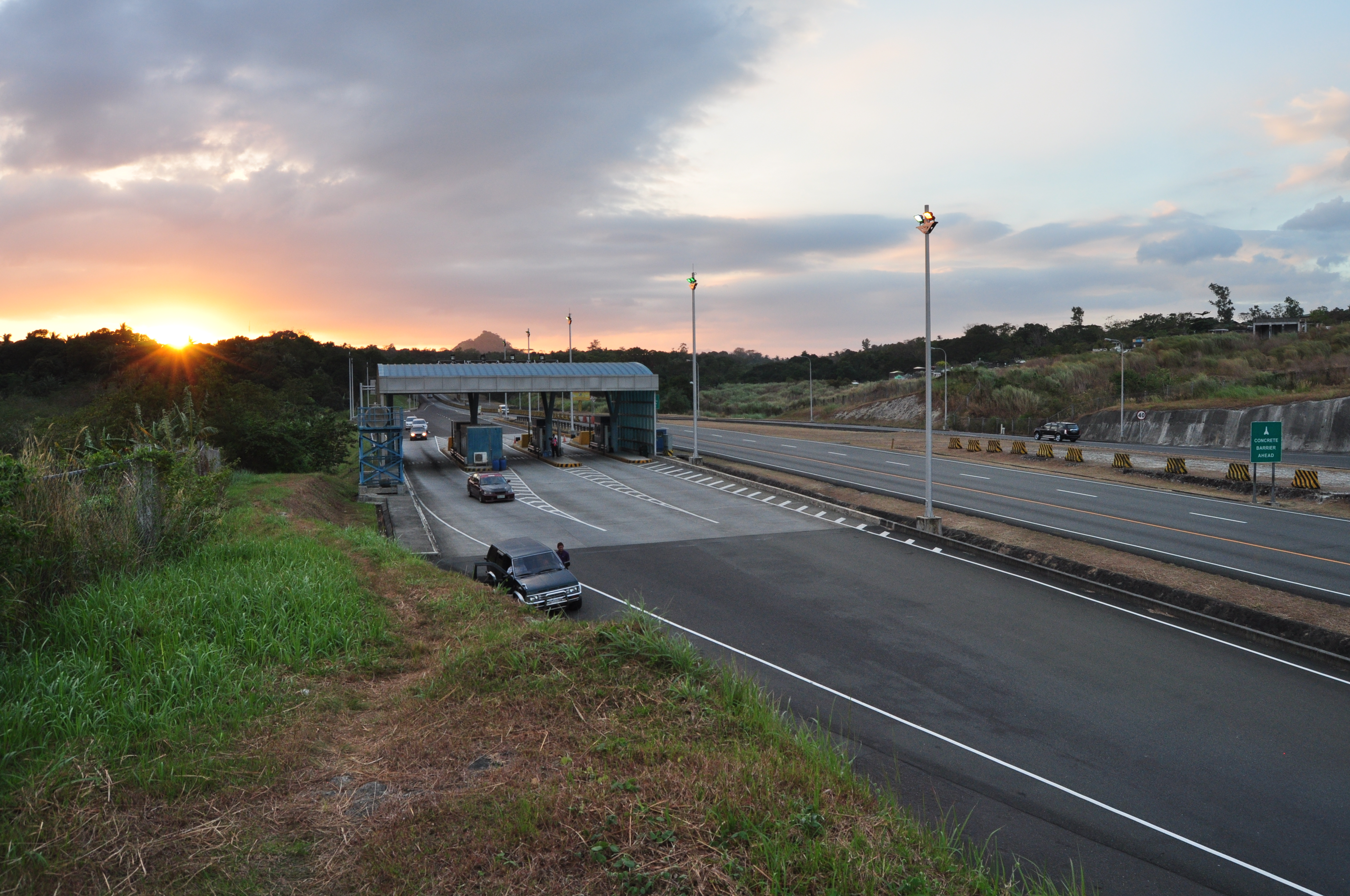 Tipo, Bataan, Philippines